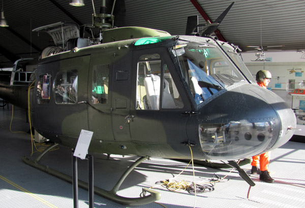 Bell UH-1D im Hubschraubermuseum Bückeburg